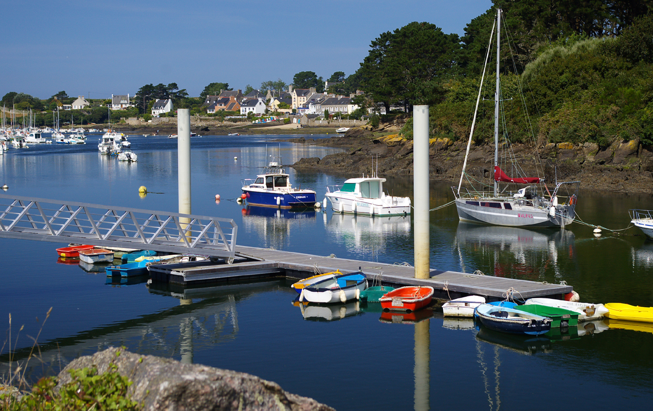 Ponton de Kerglonou, commune de Plouarzel, sur l'Aber-Ildut. Finistere, France